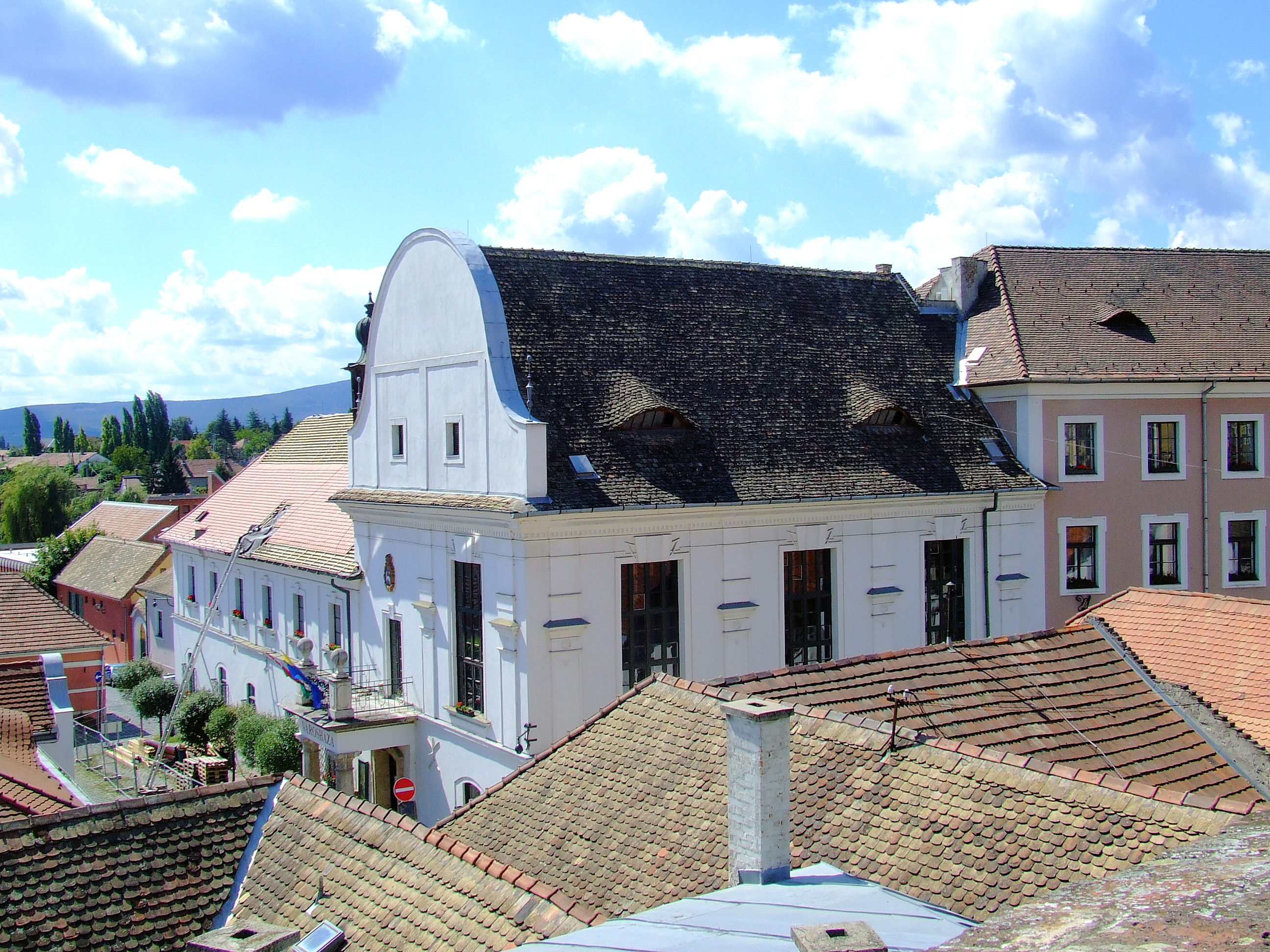 A szentendrei városháza